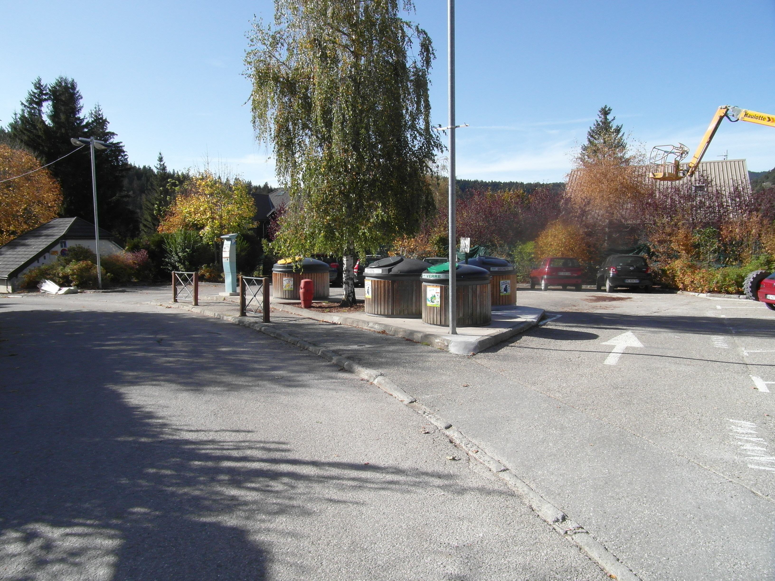 Villard-de-Lans square and parking